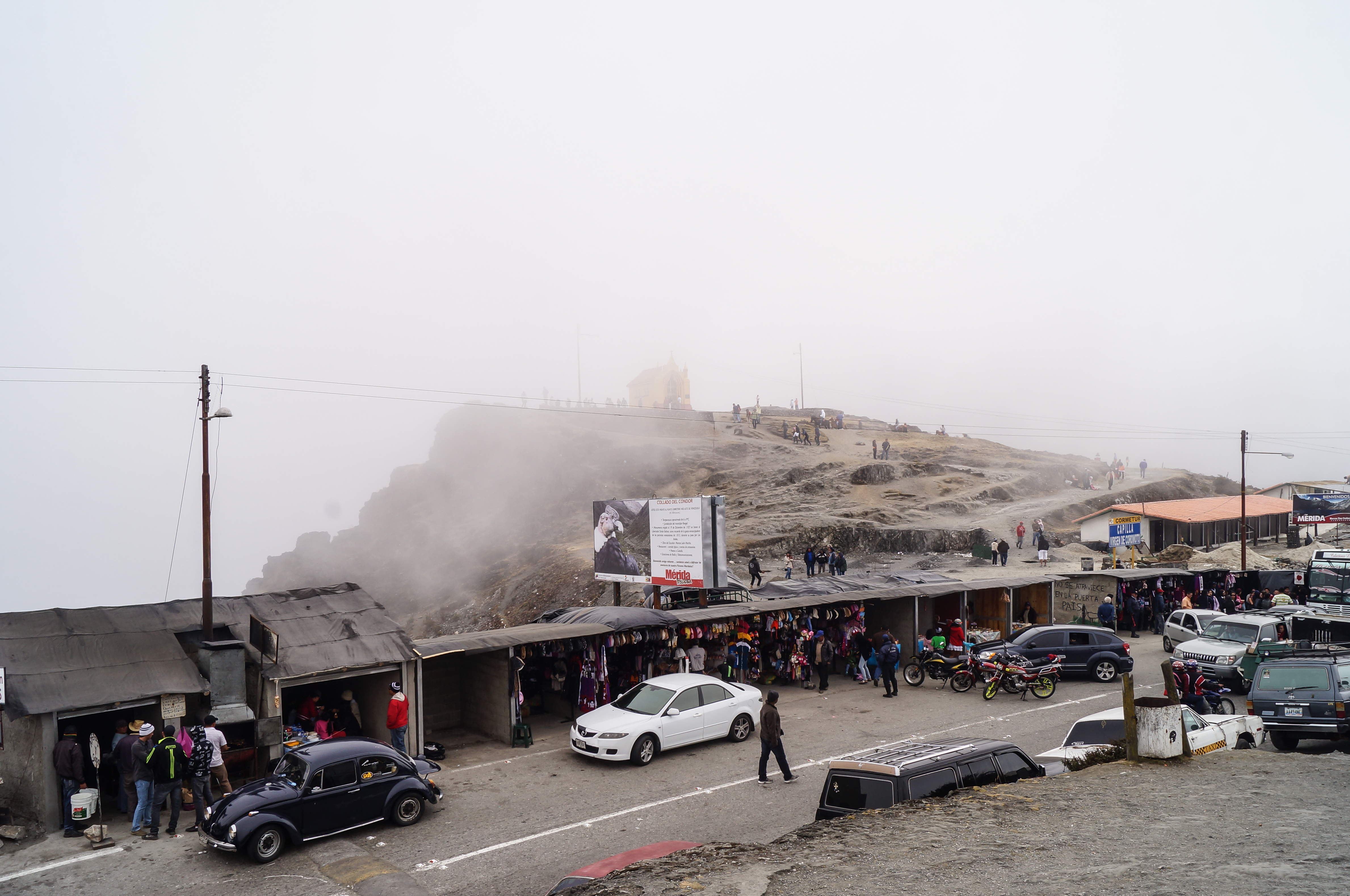 Es el punto más alto de la carretera trasandina. Está situado entre las poblaciones de Timotes y Apartaderos, y se encuentra a una altura de 4.118 metros sobre el nivel del mar. Conocido como Pico El Aguila. Mérida. Venezuela.